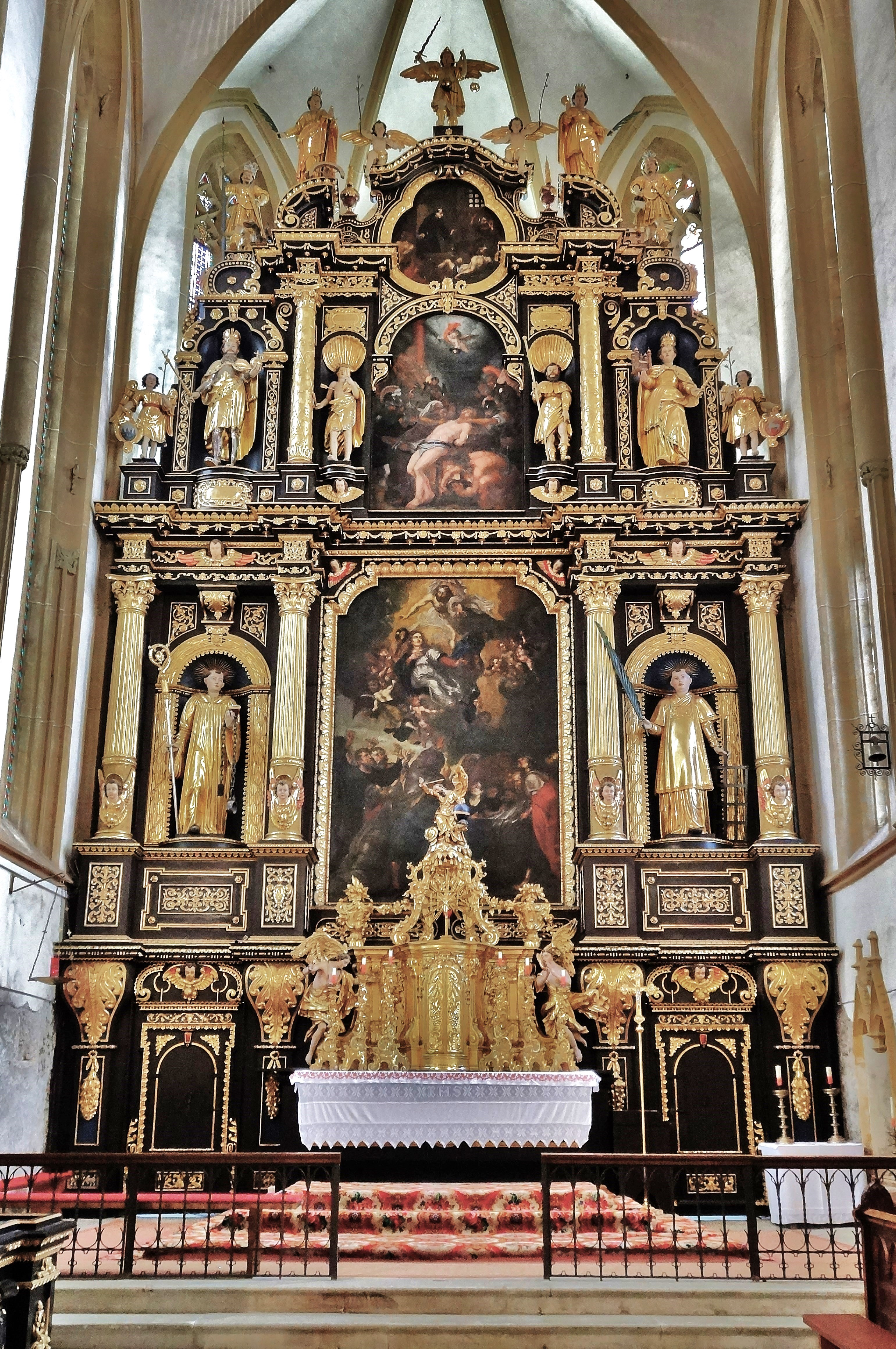 Kath. Pfarrkirche St. Leonhard im Lavanttal, der Hochaltar